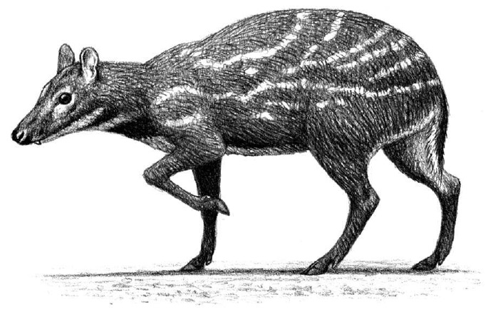 Life reconstruction of an adult male Dorcatherium. Illustration by Mauricio Antón.